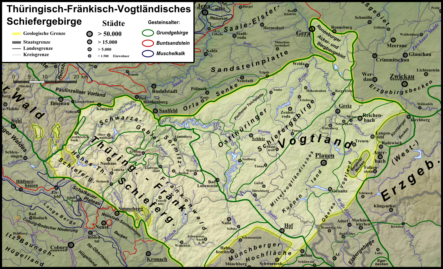 Naturraumkarte des Thüringisch-Fränkisch-Vogtländischen Schiefergebirges in seinen geologischen Grenzen; hervorgehoben sind auch die inselartig im Thüringer Wald liegenden Schleuse-Horst und Vesser-Komplex; umgekehrt sind die halbinselartigen Thüringer-Wald-Ausläufer Masserberger und Crocker Scholle sowie die Erzgebirgs-Exclave Bergener Becken abgedunkelt, ebenso der im Inneren liegende Teil des Stockheimer Beckens östlich Sonnebergs.